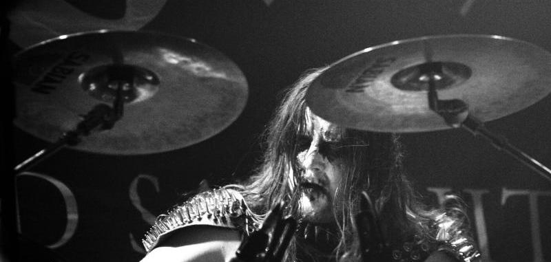 Vyl, batería de Gorgoroth.